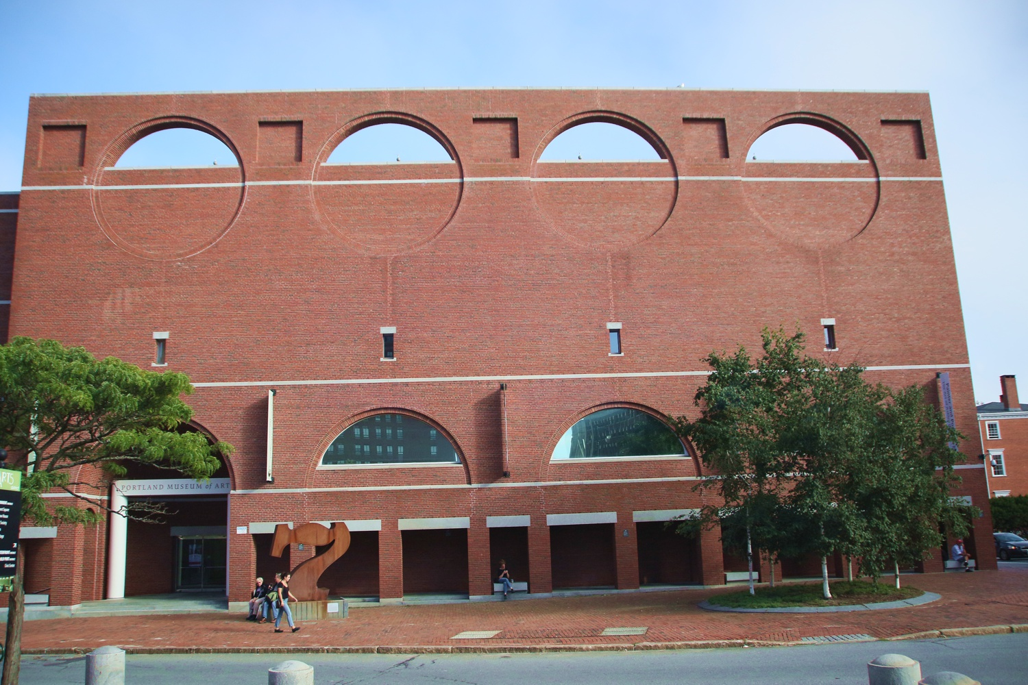 Charles Shipman Payson Building, Erweiterungsbau des Portland Museum of Arts